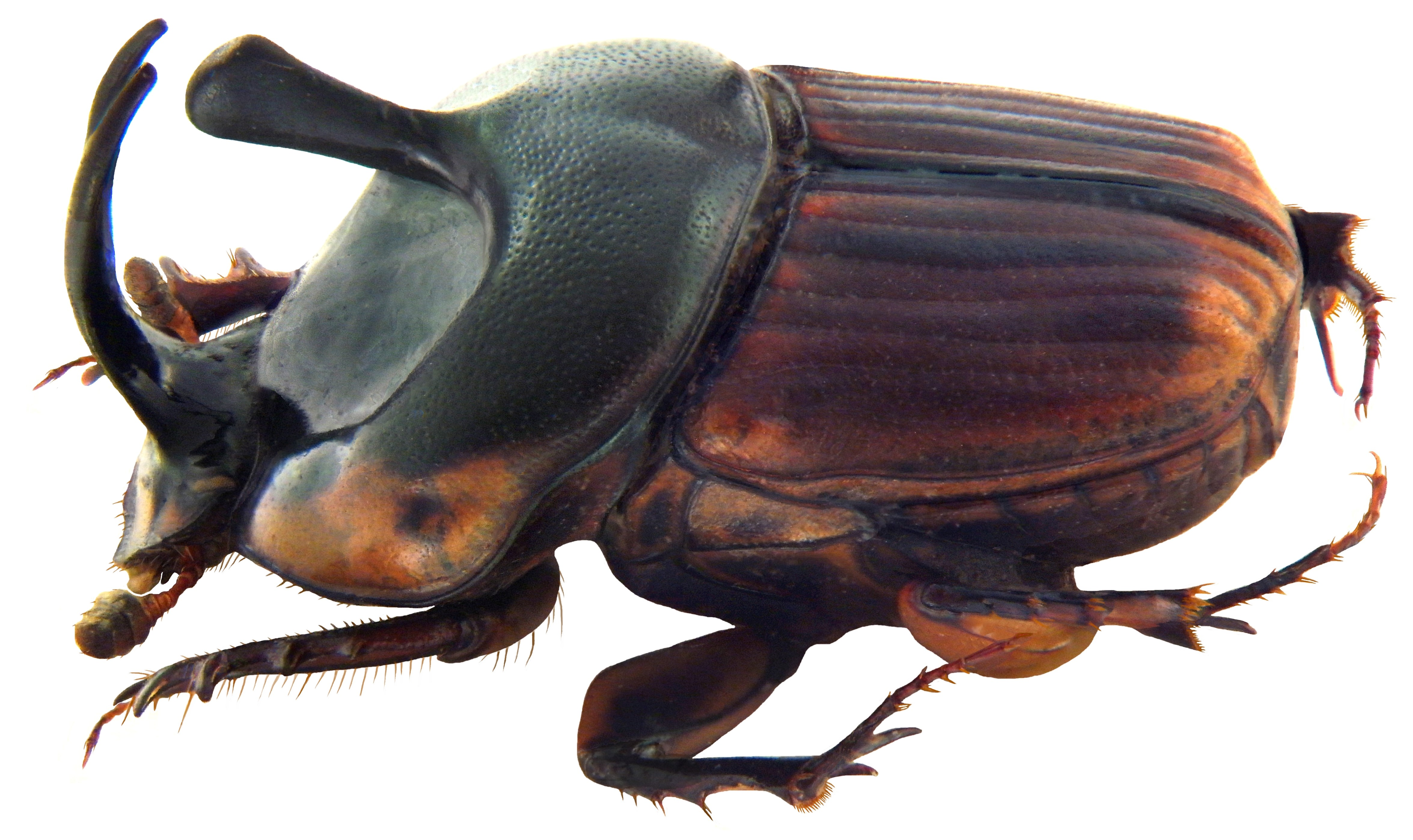 Familie: Scarabaeidae Groesse: 8,8 mm Fundort: Nepal, Marsyandi-Tal, leg. Baum, 1982; det. J.Scheuern, 1989 Photo: U.Schmidt, 2010